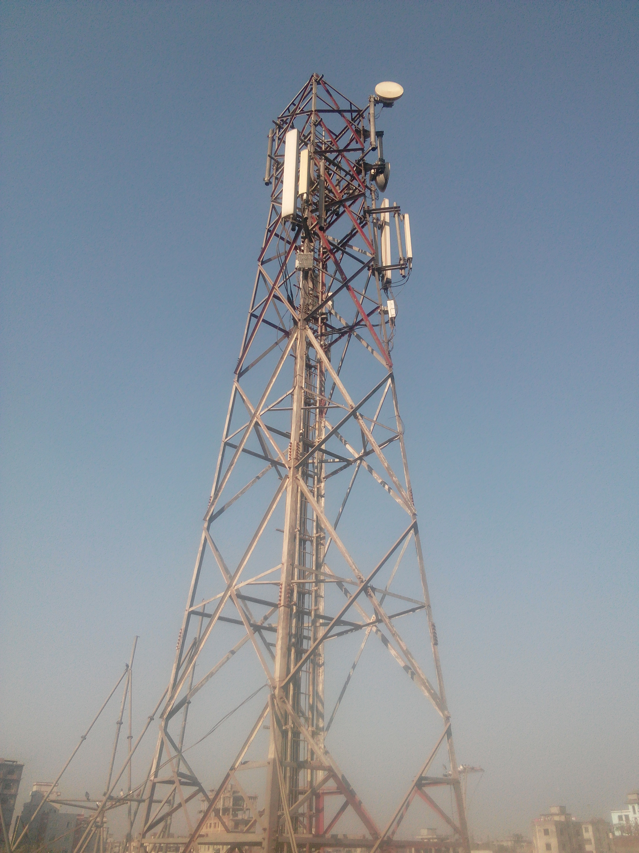 একটি মোবাইল ফোন টাওয়ার।